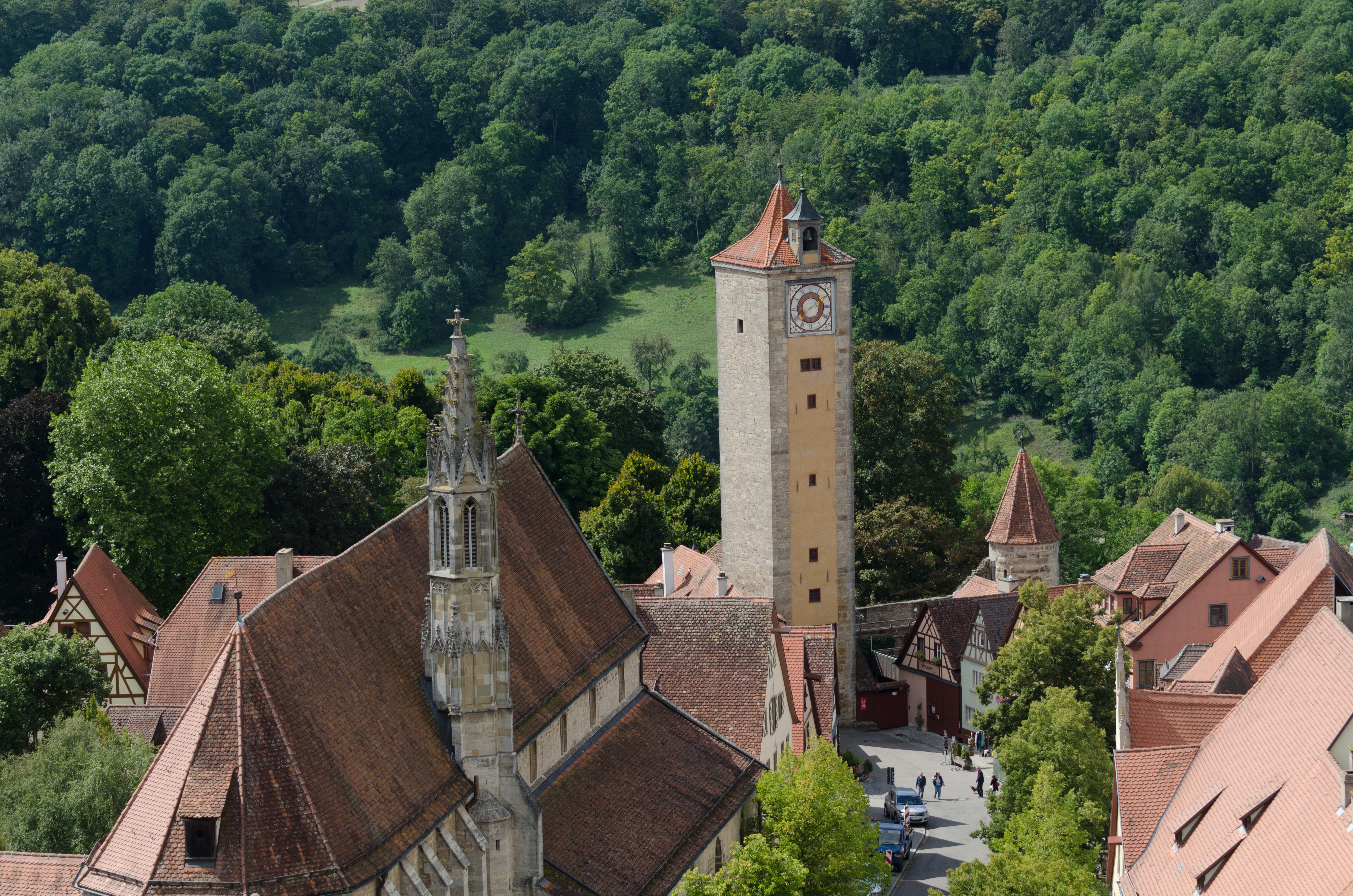 Rothenburg ob der Tauber, Burgtorturm